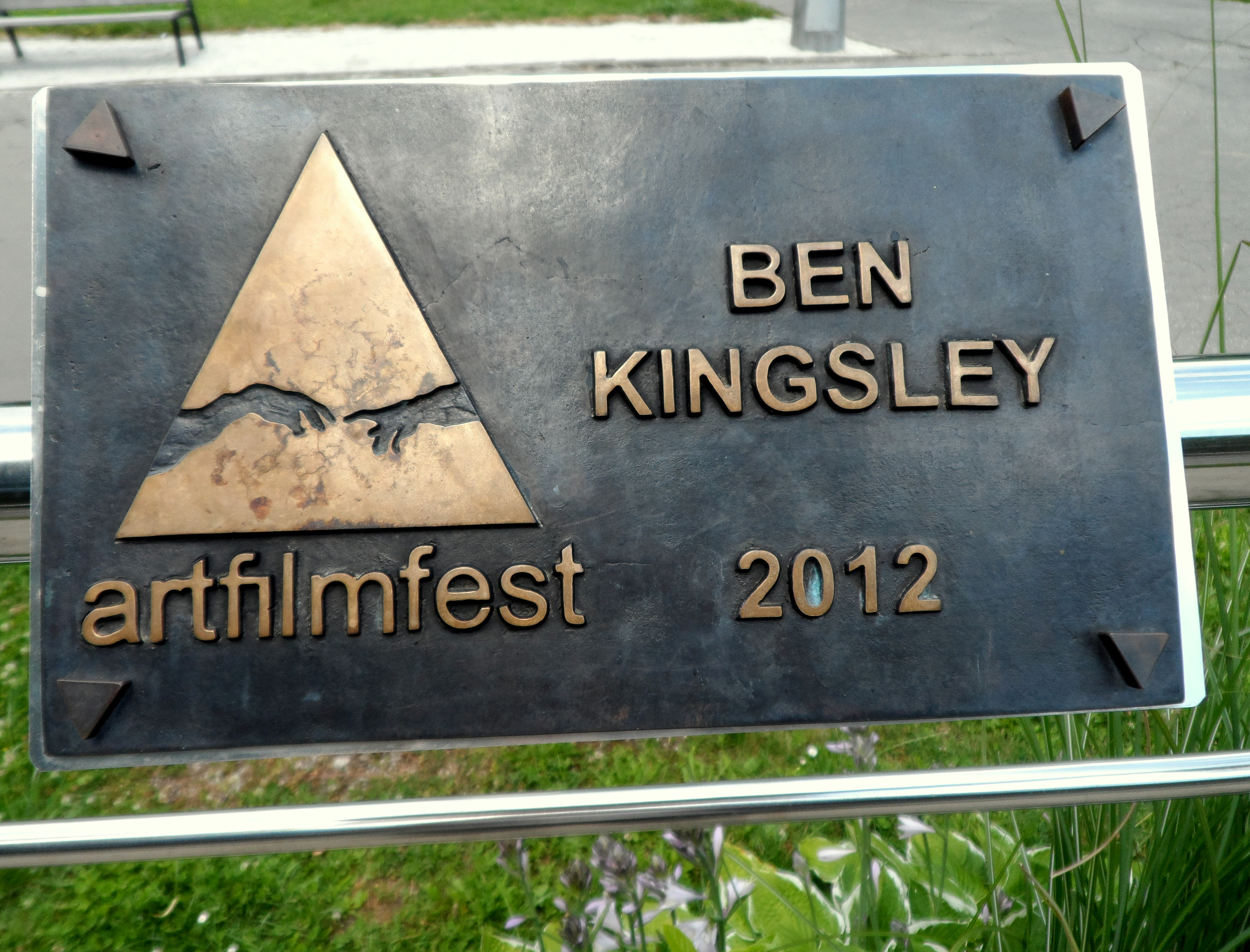 Mosadzná plaketa: „HERCOVA MISIA“ (Actor‘s Mission Award). Medzinárodný filmový festival Art Film Fest, Trenčianske Teplice 2012